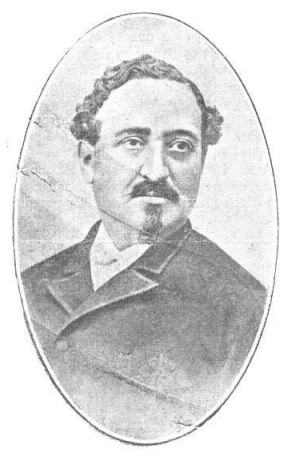 Fernando Fernández de Velasco